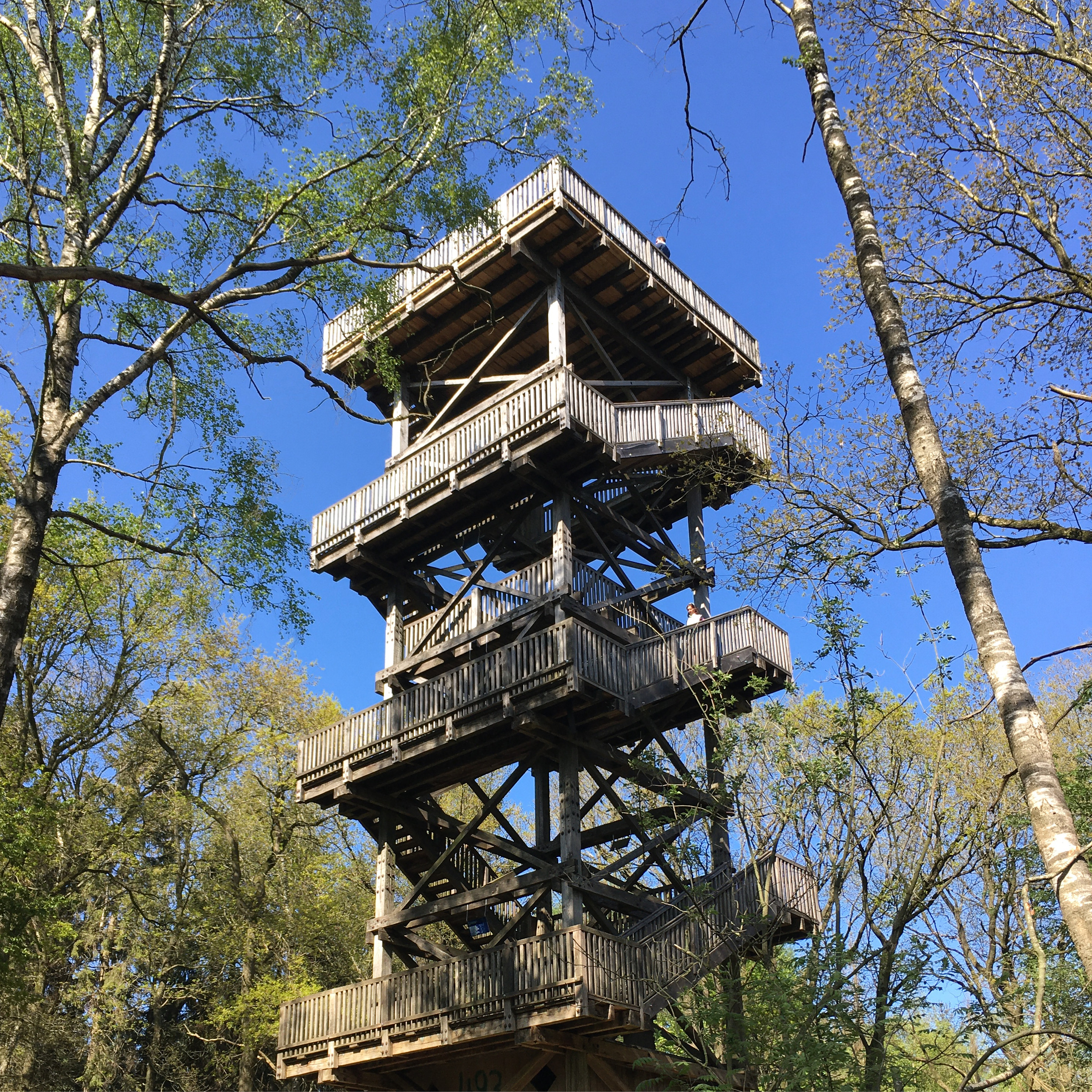 Der Aussichtsturm auf dem Mordkuhlenberg in den Dammer Bergen.